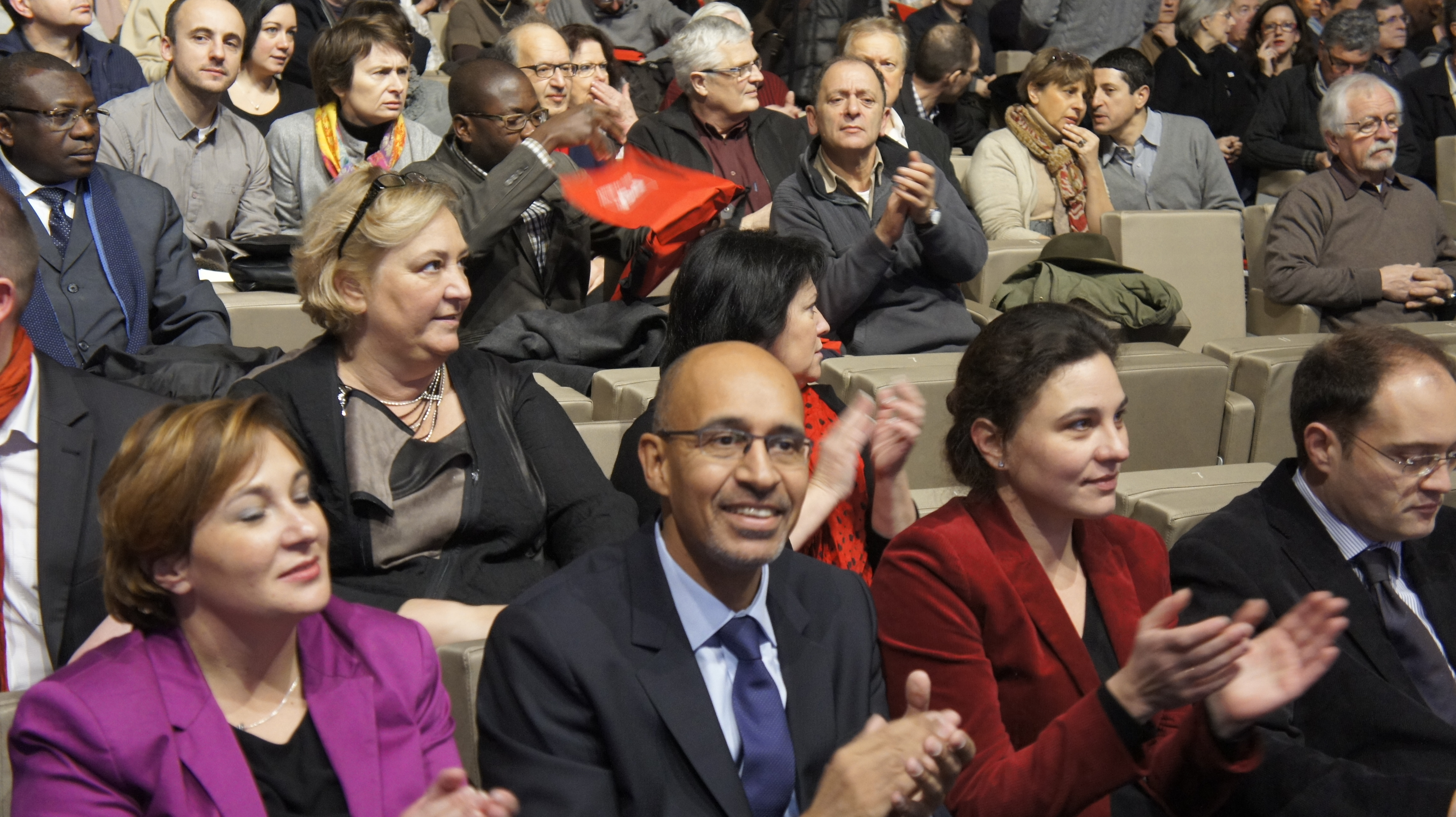 Harlem Désir à la Mutualite pour la réunion des secrétaires de section à sa gauche, Guillaume Bachelay .